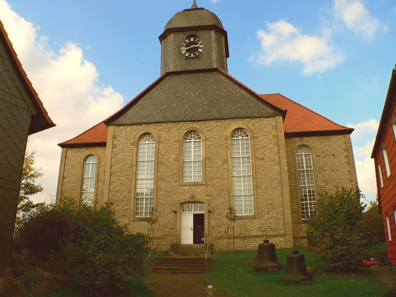 Kirche Scheden-Oberscheden